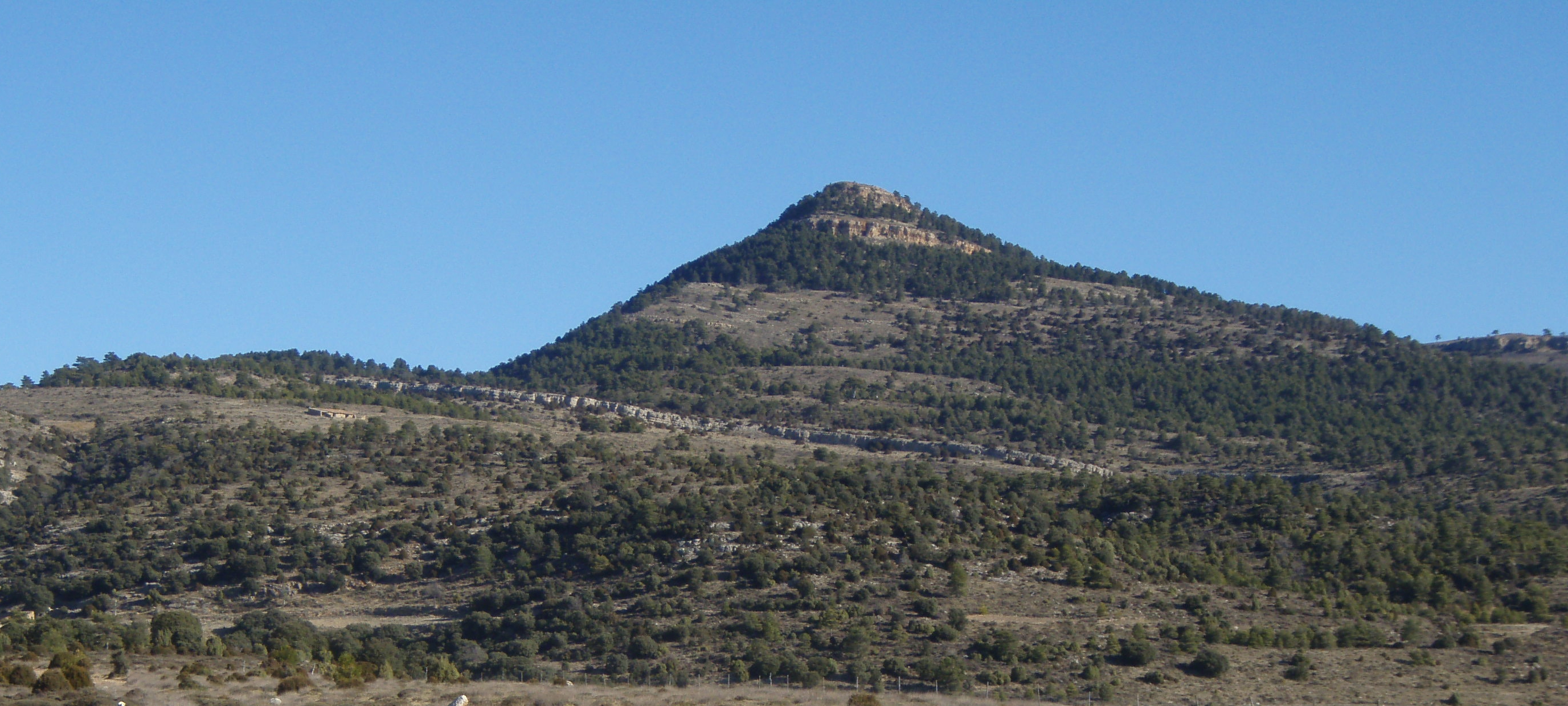 Cabezo de las Cruces (1.710 m.s.n.m.)